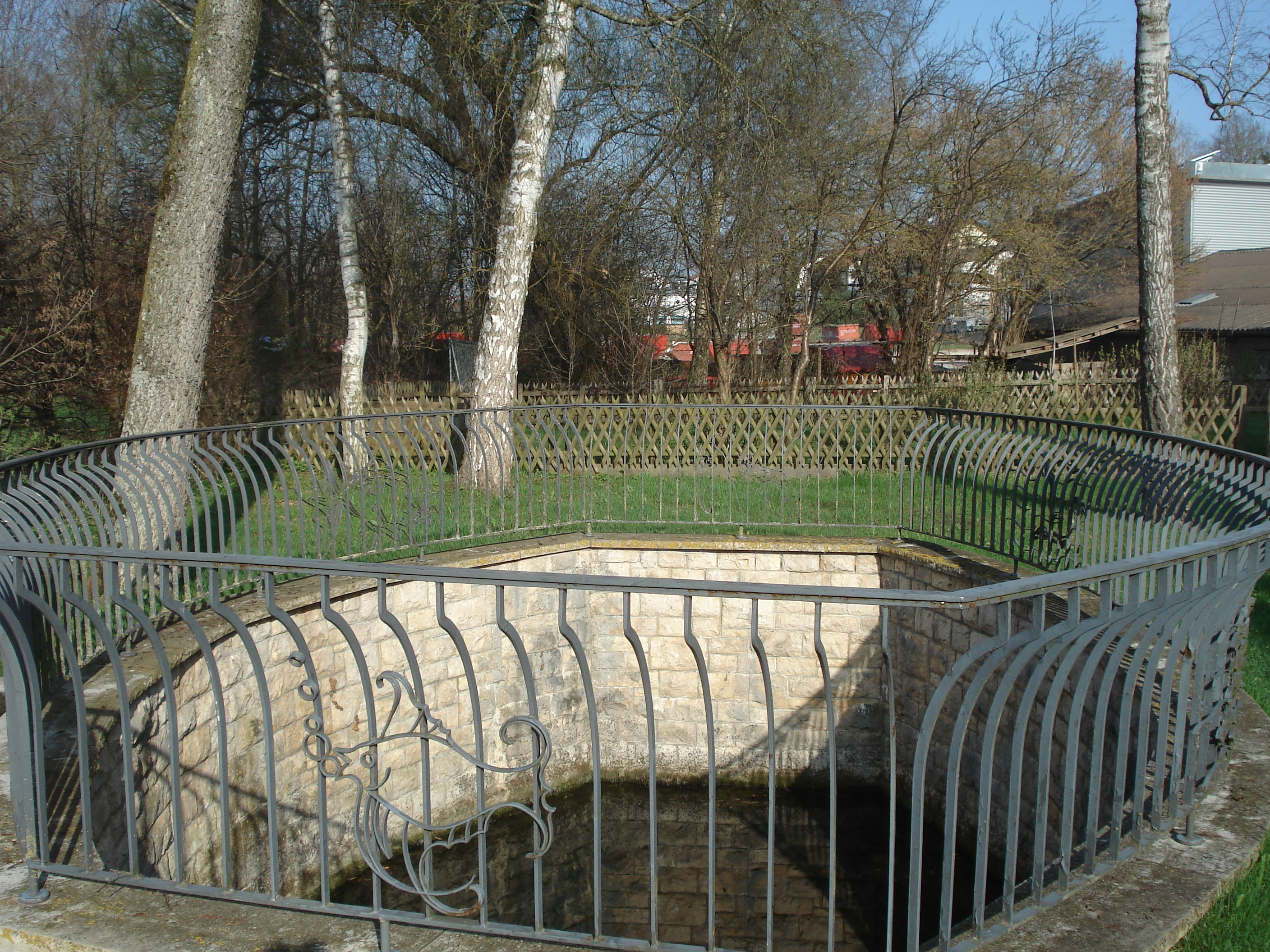 Der Egau-Ursprung in Neresheim